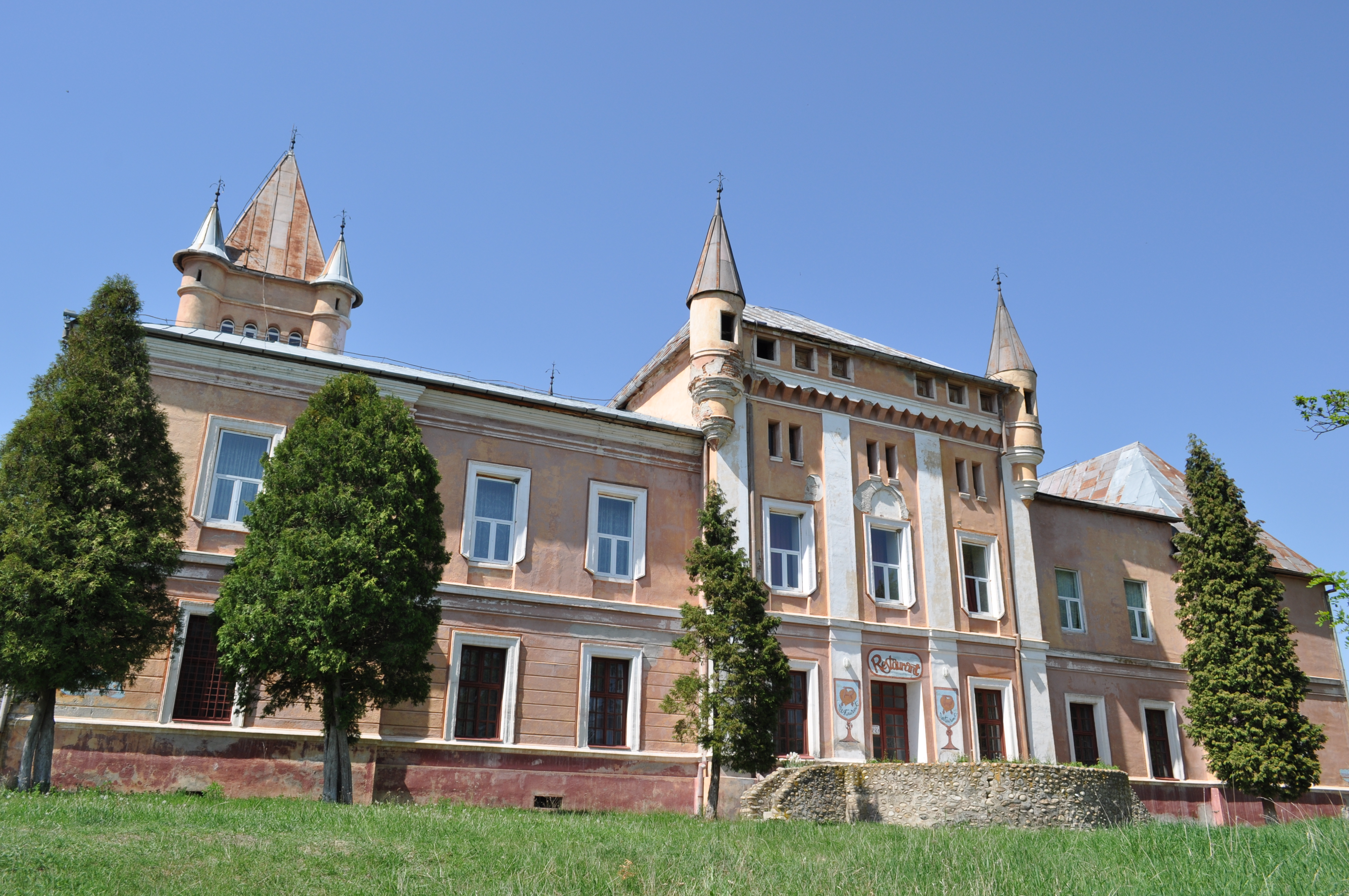 Castelul Kendeffy din Sântămăria-Orlea, județul Hunedoara 01